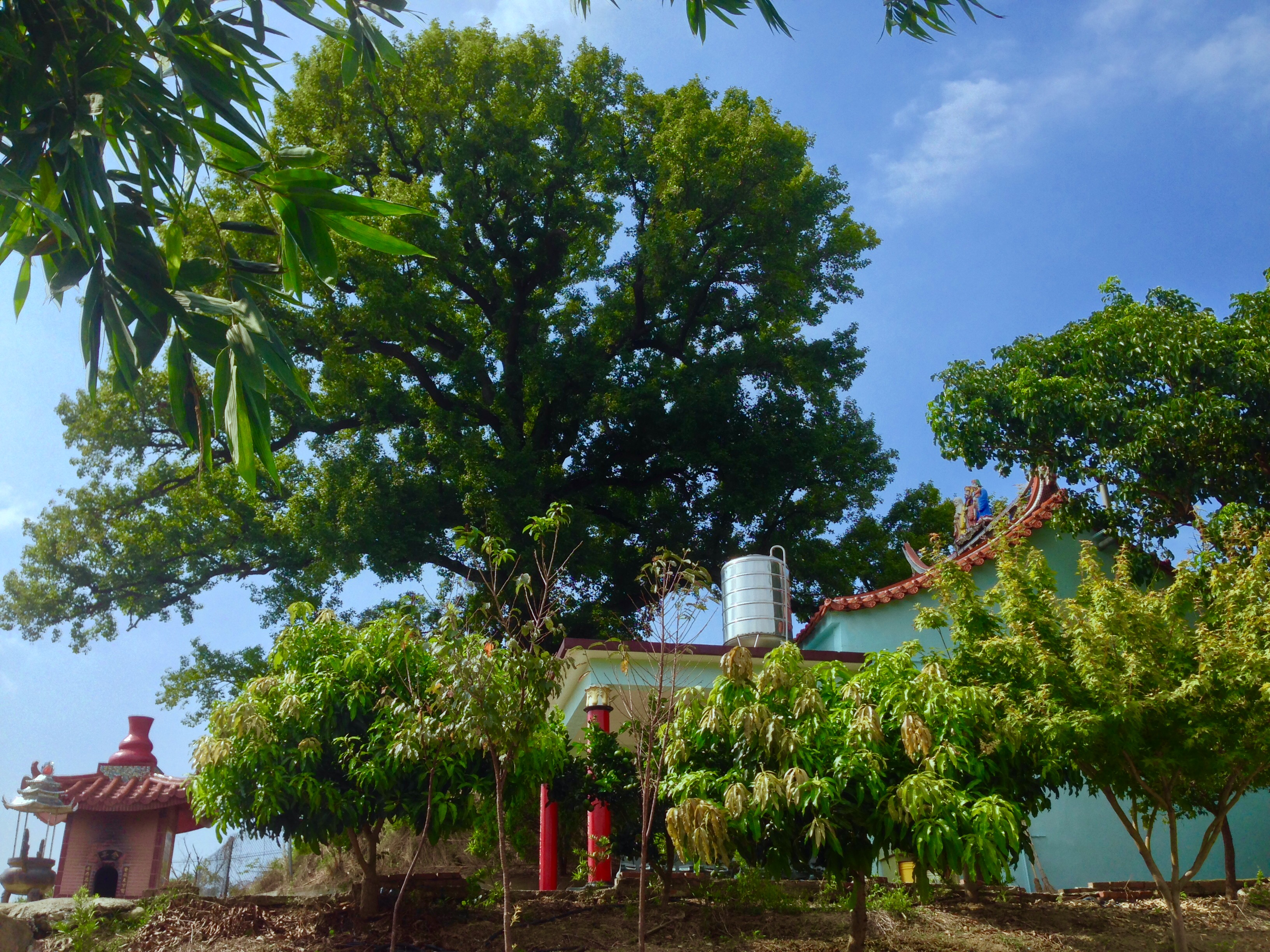 中文（台灣）: 永和山福德祠側面與楓樹